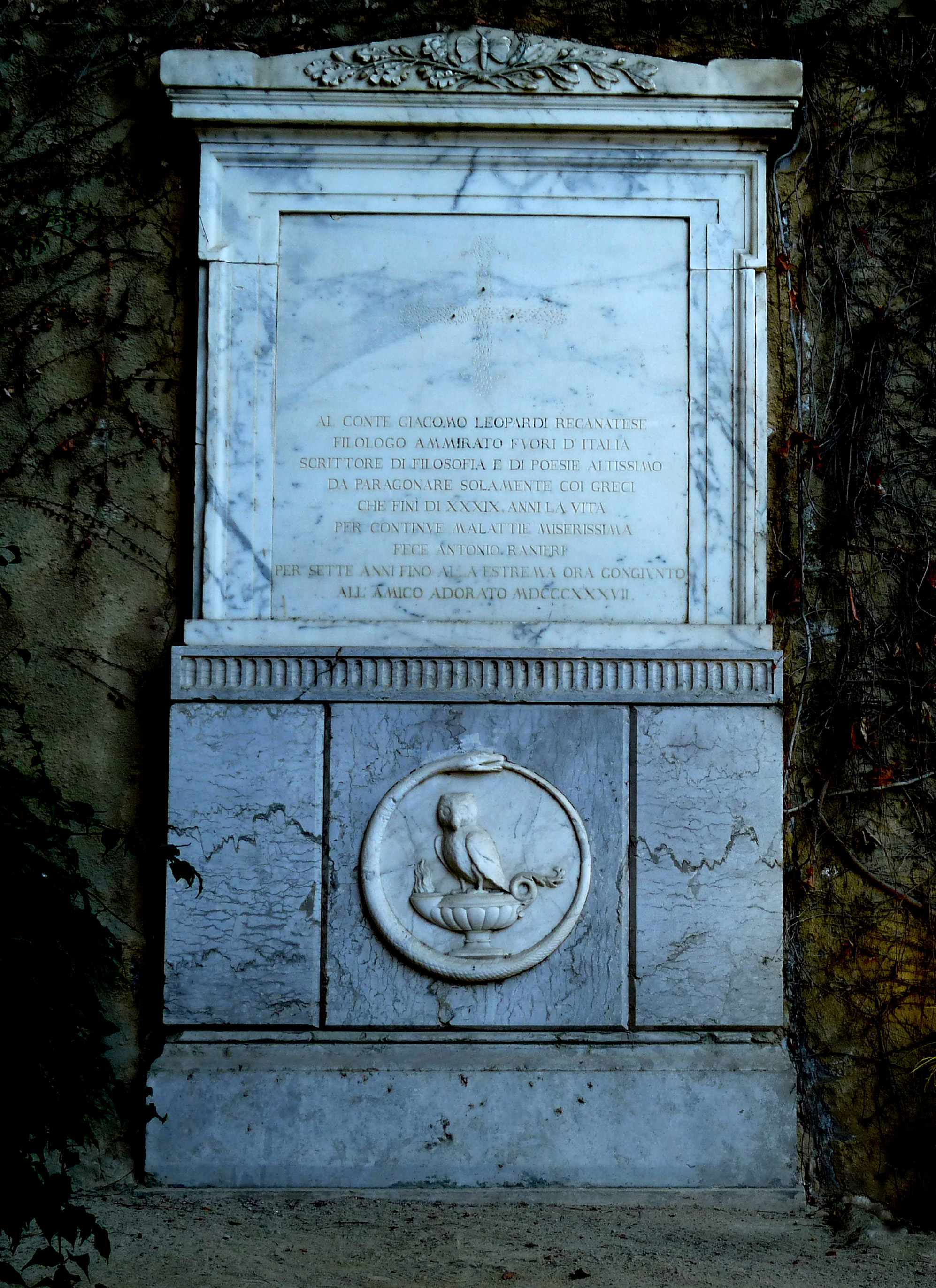 Giacomo Leopardi morì a Napoli di idropisia nel 1837 mentre in città c' era un'epidemia di colera. La lapide sepolcrale del poeta, del 1844 e fino al 1939 nell'atrio della chiesa di San Vitale a Fuorigrotta, riporta un’epigrafe commissionata dall' amico Ranieri con testo di Pietro Giordano e una serie di simboli: la civetta, la lucerna, il serpente che si morde la coda e la farfalla che vola su un ramo di lauro, pianta simbolo dei sommi poeti, ed un ramo di quercia, pianta consacrata a Giove. La tomba del poeta è a pochi passi, all'interno dello stesso Parco Virgiliano a Piedigrotta. - Il testo dell' epigrafe: "Al conte Giacomo Leopardi recanatese filologo ammirato fuori d'Italia scrittore di filosofia e di poesie altissimo da paragonare solamente coi greci che finì di XXXIX anni la vita per continue malattie miserissima fece Antonio Ranieri per sette anni fino all'estrema ora congiunto all'amico adorato MDCCCXXXVII"